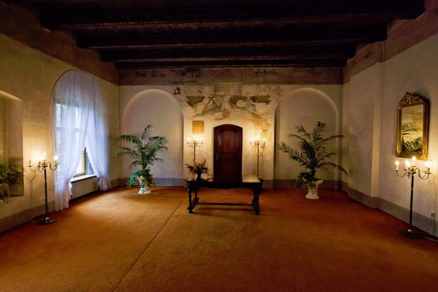 Großer Saal im Neuen Schloss, Foto von Fam. Mayerh. 2010